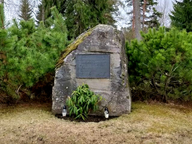 Мемориальный камень у церкви в Китеэ в память погибшим солдатам.